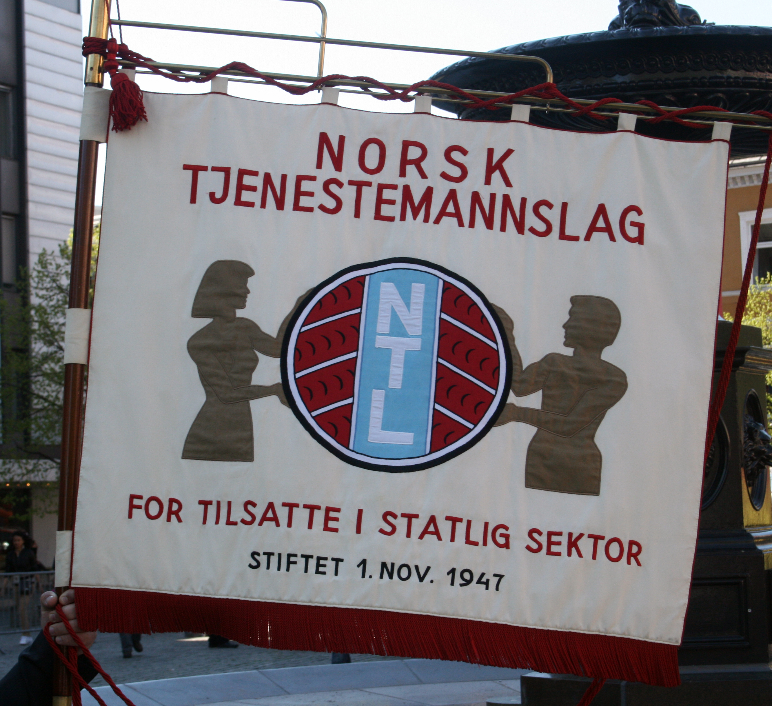 Norsk tjenestemannslags fane